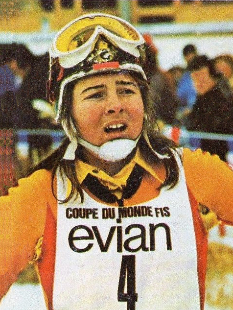 CAMPIONI dello SPORT 1973/74-Figurina n.338- NADIG - SVIZZERA -SCI-Rec